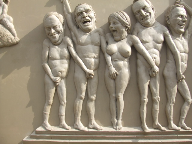 Detail der Skulptur Ludwigs Erbe von Peter Lenk, Ludwigshafen am Bodensee, von links nach rechts: Hans Eichel, Gerhard Schröder, Angela Merkel, Edmund Stoiber und Guido Westerwelle